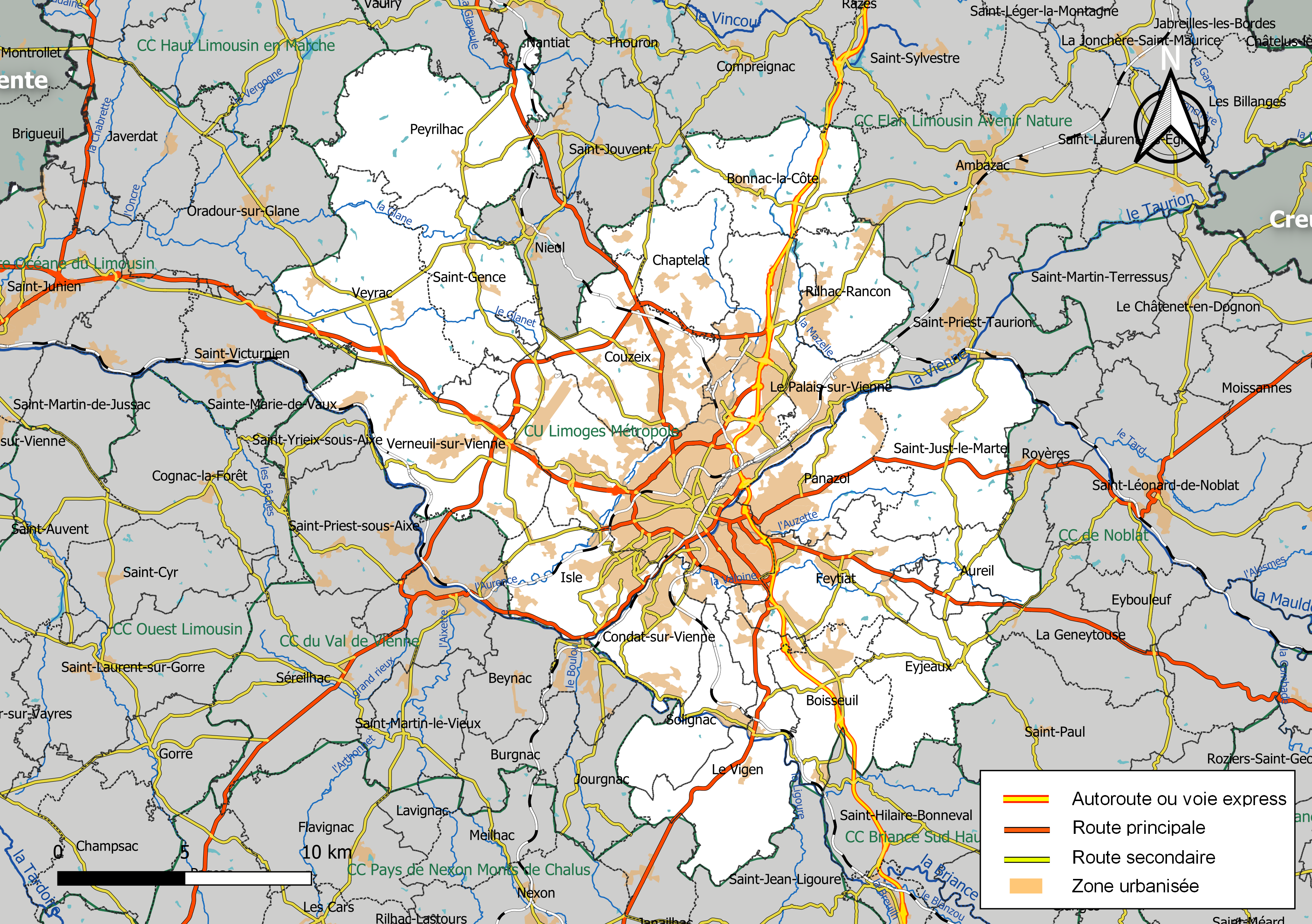 Carte géographique de la Communauté urbaine Limoges Métropole, département de la Haute-Vienne, France. Composition au 1er janvier 2019.